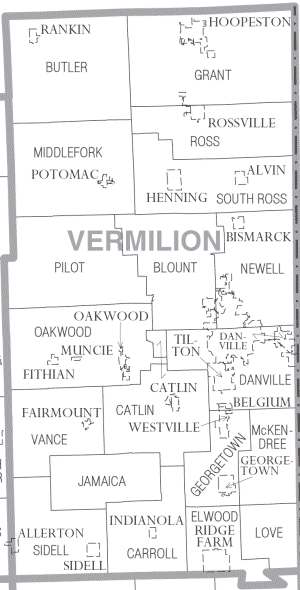 Vermilion County Illinois